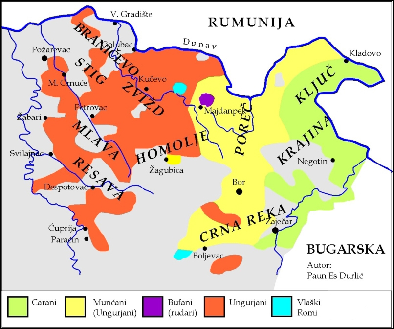 Етничка карта Влаха источне Србије. Приказује географски распоред три основне групе Влаха: Царана, Унгурјана и Мунћана, као и распоред неких мањих група Влаха, као што су Буфани (рудари) и влашки Роми. Карту је израдио етнолог Паун Ес Дурлић, кустос Музеја у Мајданпеку, на основу сопствених истраживања. Напомена: подаци са мапе не одговарају званичним подацима са пописа становништва у Србији 2002. године.